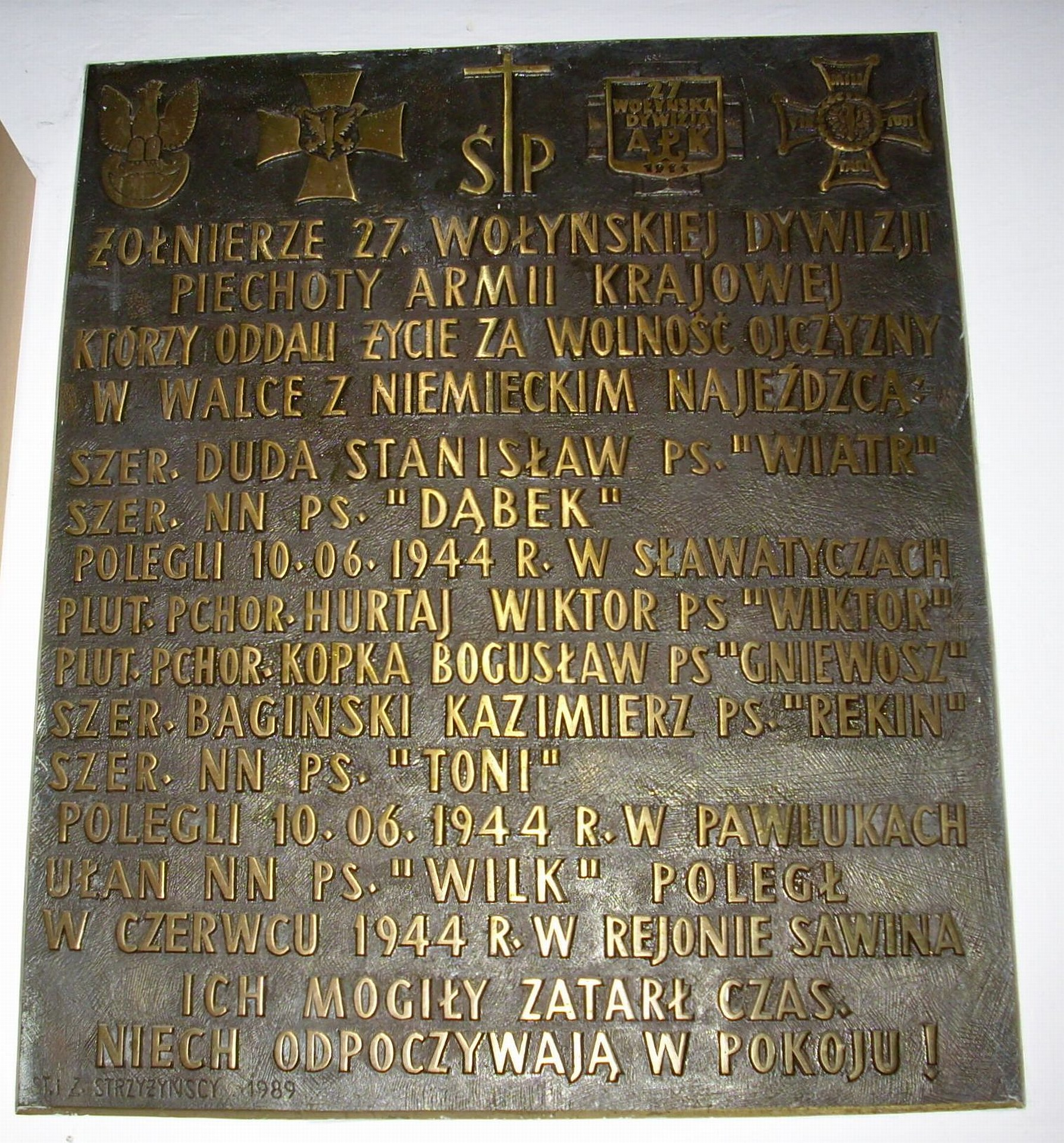 Tablica pamiątkowa poświęcona żołnierzom 27. Wołyńskiej Dywizji Piechoty Armii Krajowej w kościele w Sławatyczach. Treść inskrypcji: Żołnierze 27. Wołyńskiej Dywizji Piechoty Armii Krajowej, którzy oddali życie za wolność ojczyzny w walce z niemieckim najeźdźcą: szer. Duda Stanisław ps. "Wiatr", szer. NN ps. "Dąbek" – polegli 10.06.1944 r. w Sławatyczach; plut. pchor. Hurtaj Wiktor ps. "Wiktor", plut. pchor. Kopka Bogusław ps. "Gniewosz", szer. Bagiński Kazimierz ps. "Rekin", szer. NN ps. "Toni" – polegli 10.06.1944 r. w Pawlukach; ułan NN ps. "Wilk" – poległ w czerwcu 1944 r. w rejonie Sawina. Ich mogiły zatarł czas. Niech odpoczywają w pokoju! (St. i Z. Strzyżyńscy, 1989)